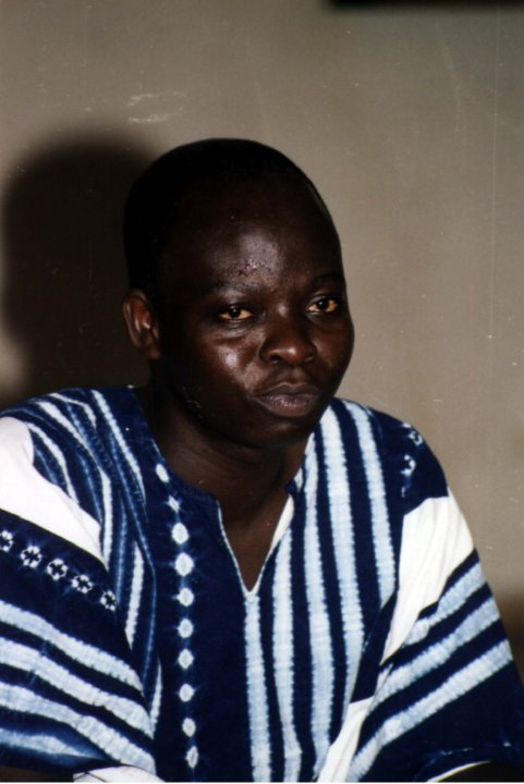 Homme de culture